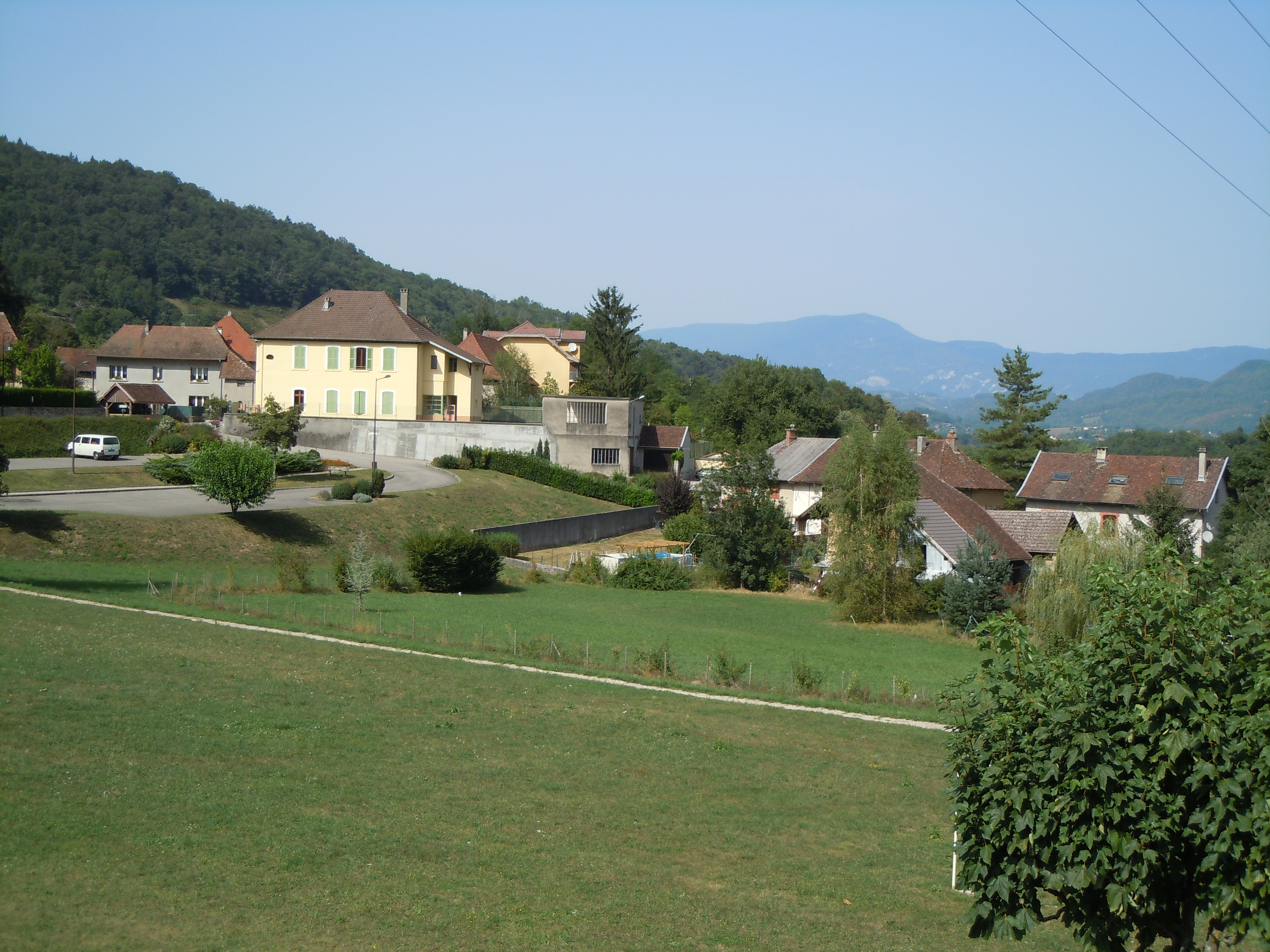 Saint-Bueil (Mairie) - Vue générale - Isère